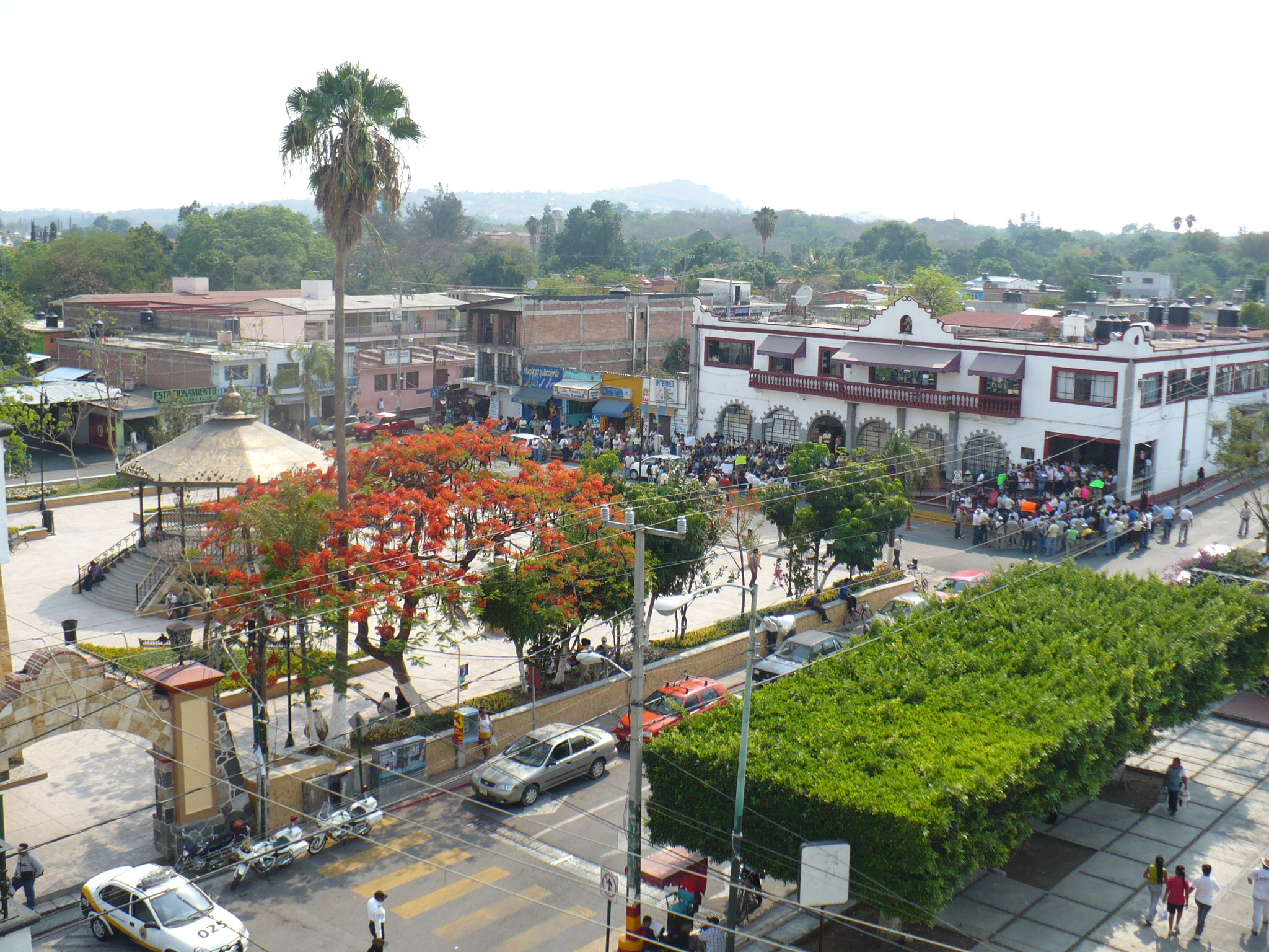 Imagen del zocalo de Jiutepec recientemente remodelado